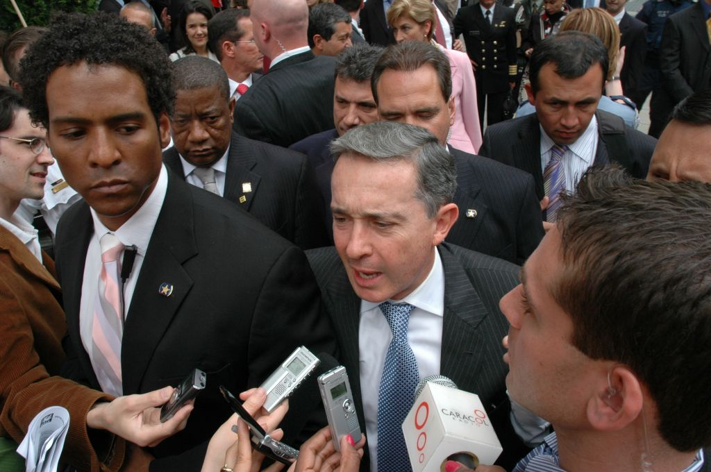 Colombian President Alvaro Uribe